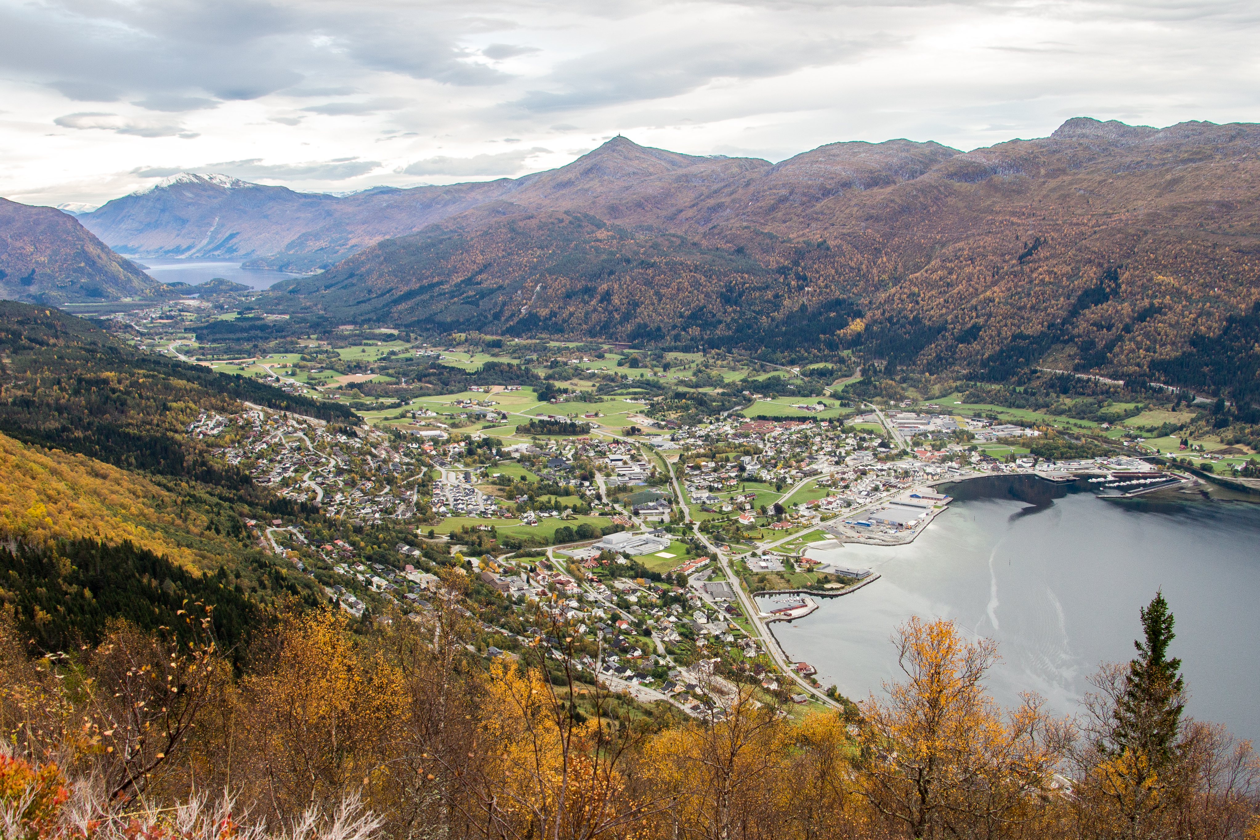 Nordfjordeid